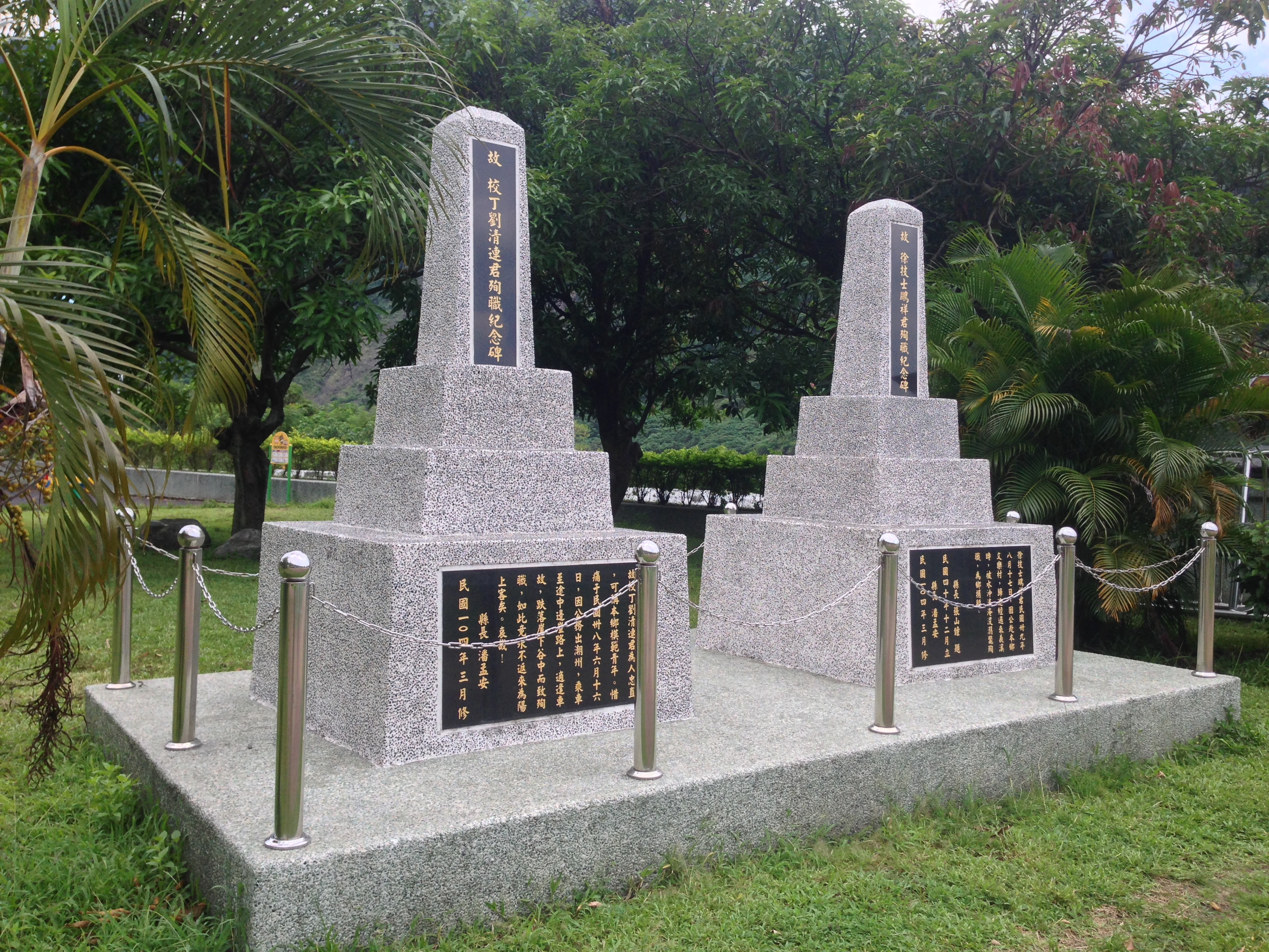 中文（台灣）: 故校丁劉清連君殉職紀念碑與徐技士鵬祥君殉職紀念碑